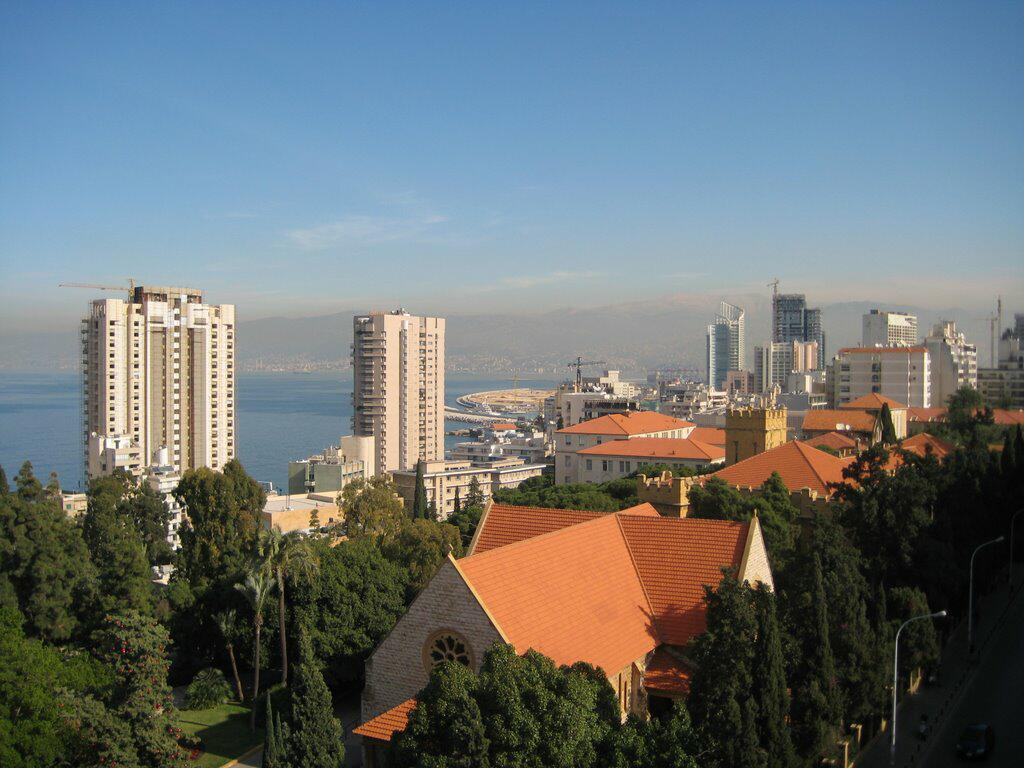 Pobřeží Středozemního moře v libanonském Bejrútu